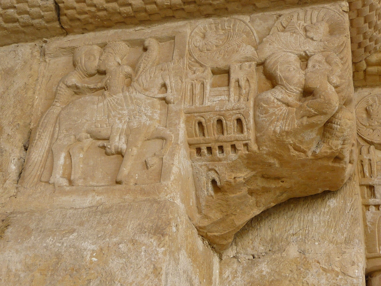 Capiteles del monesteriu de San Pedro de Villanueva, de Cangues d'Onís (Asturies - Spain)